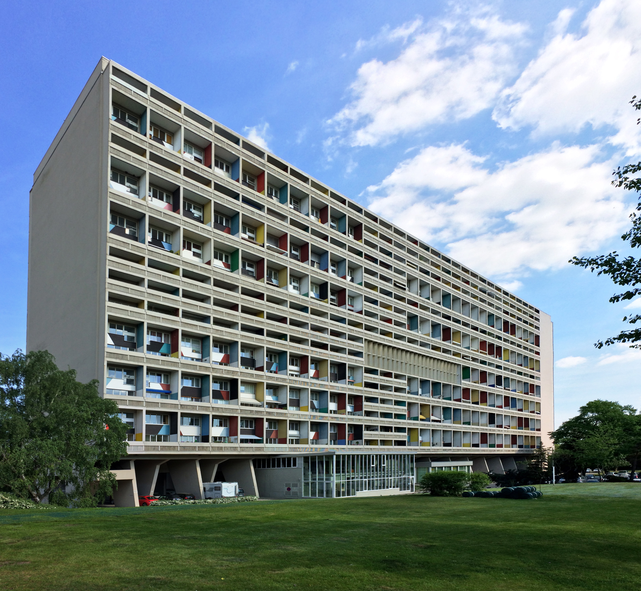 Corbusierhaus Berlin, Unité d’Habitation type Berlin, Le Corbusier (Charles-Édouard Jeanneret) & André Wogenscky sowie Felix Hinssen, Erich Böckler, Fritz Eske; Flatowallee, Berlin-Westend, 1956–1958